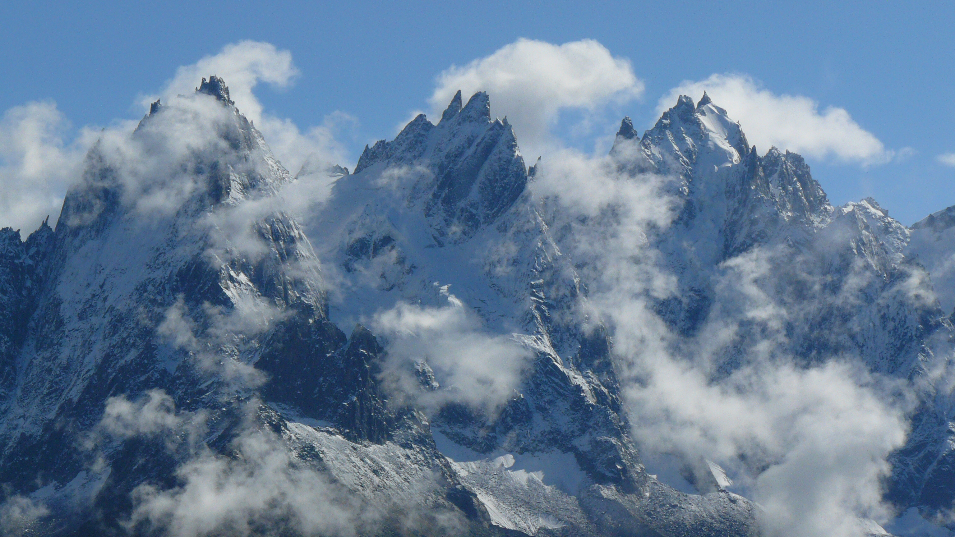 Aiguilles de Chamonix depuis L'Index